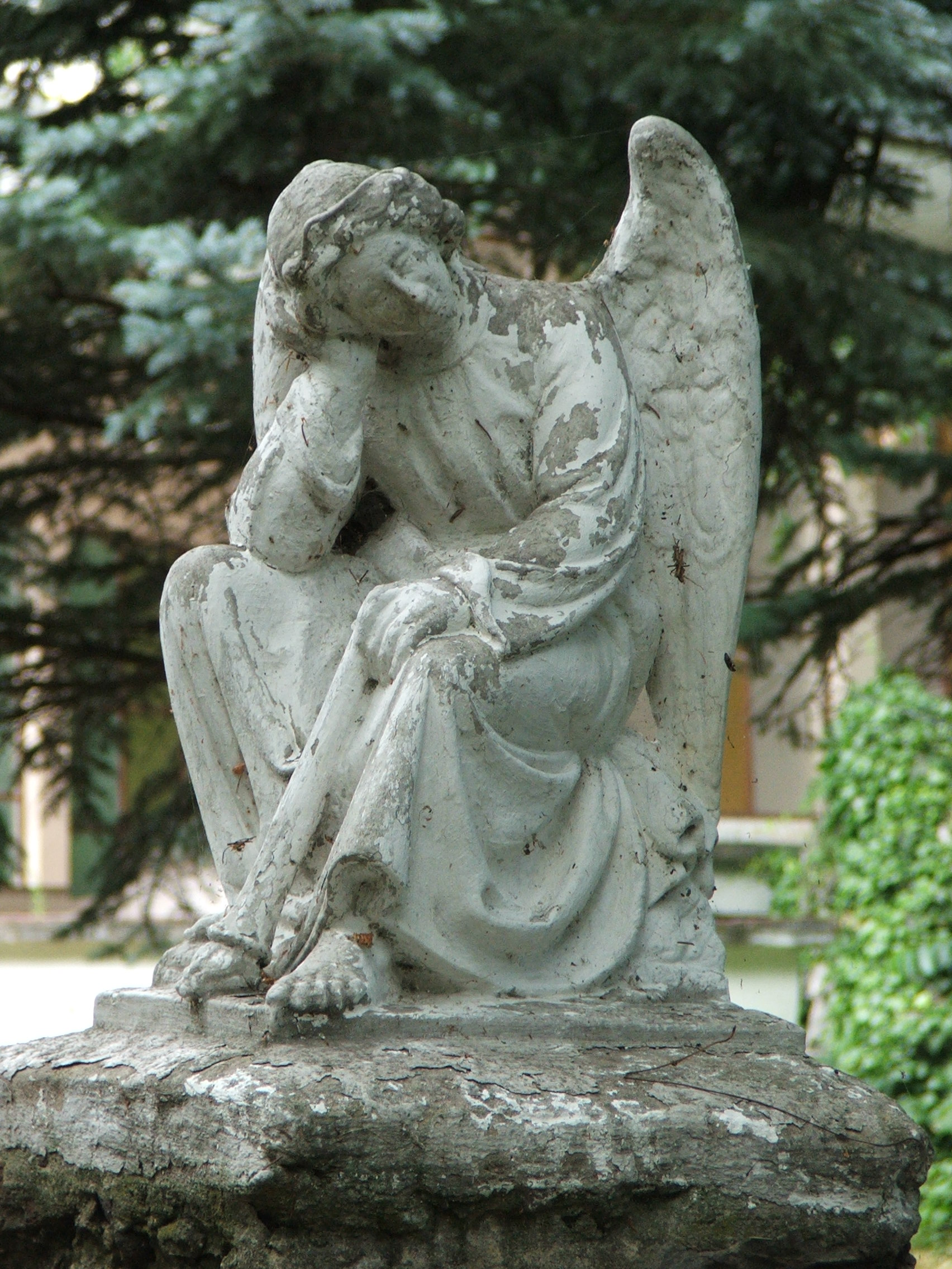 Anioł z Kalwarii w Pakości. Zdjęcie by Selena.